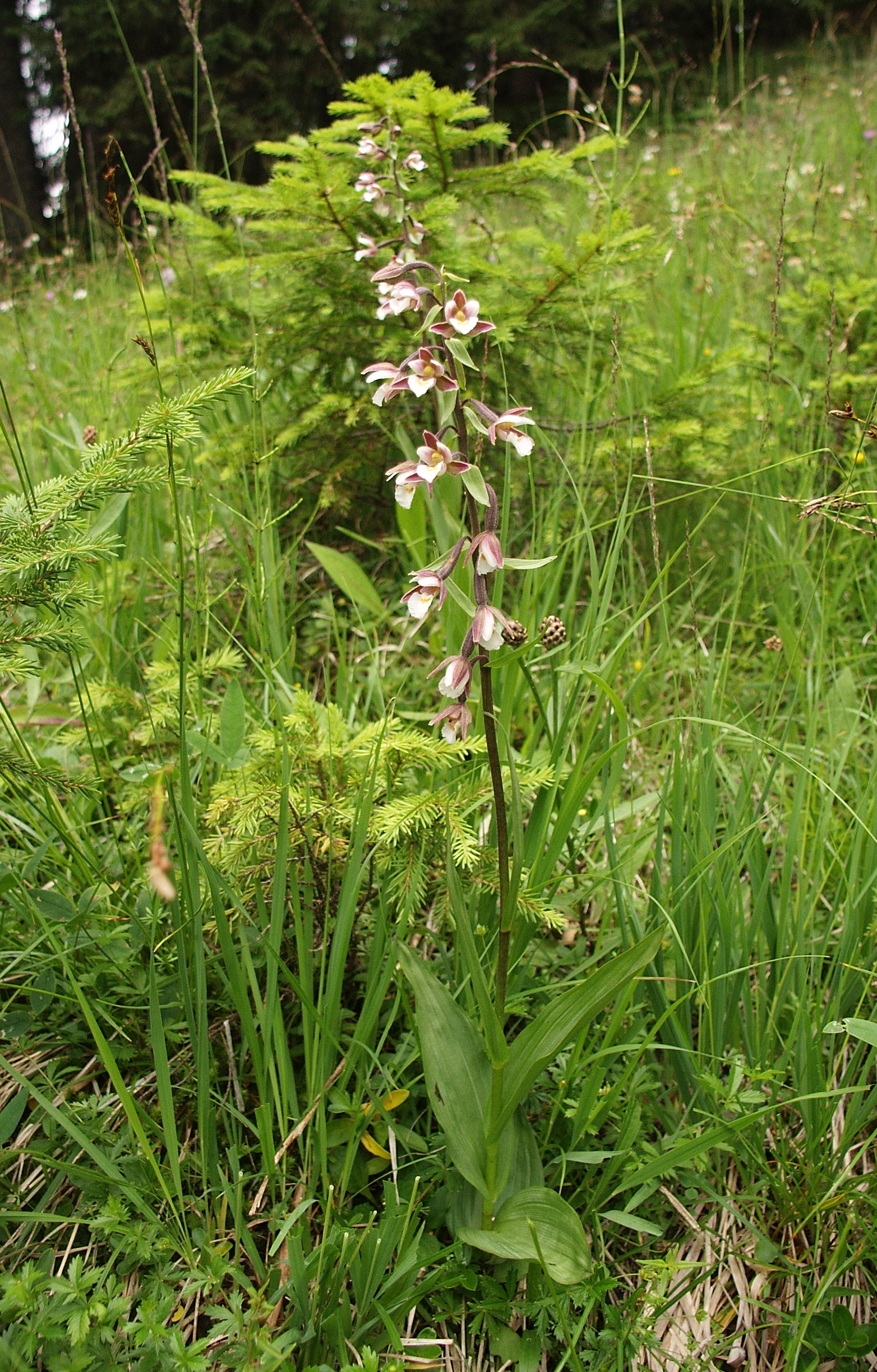 Epipactis palustris, Tannheimer Tal, Österreich